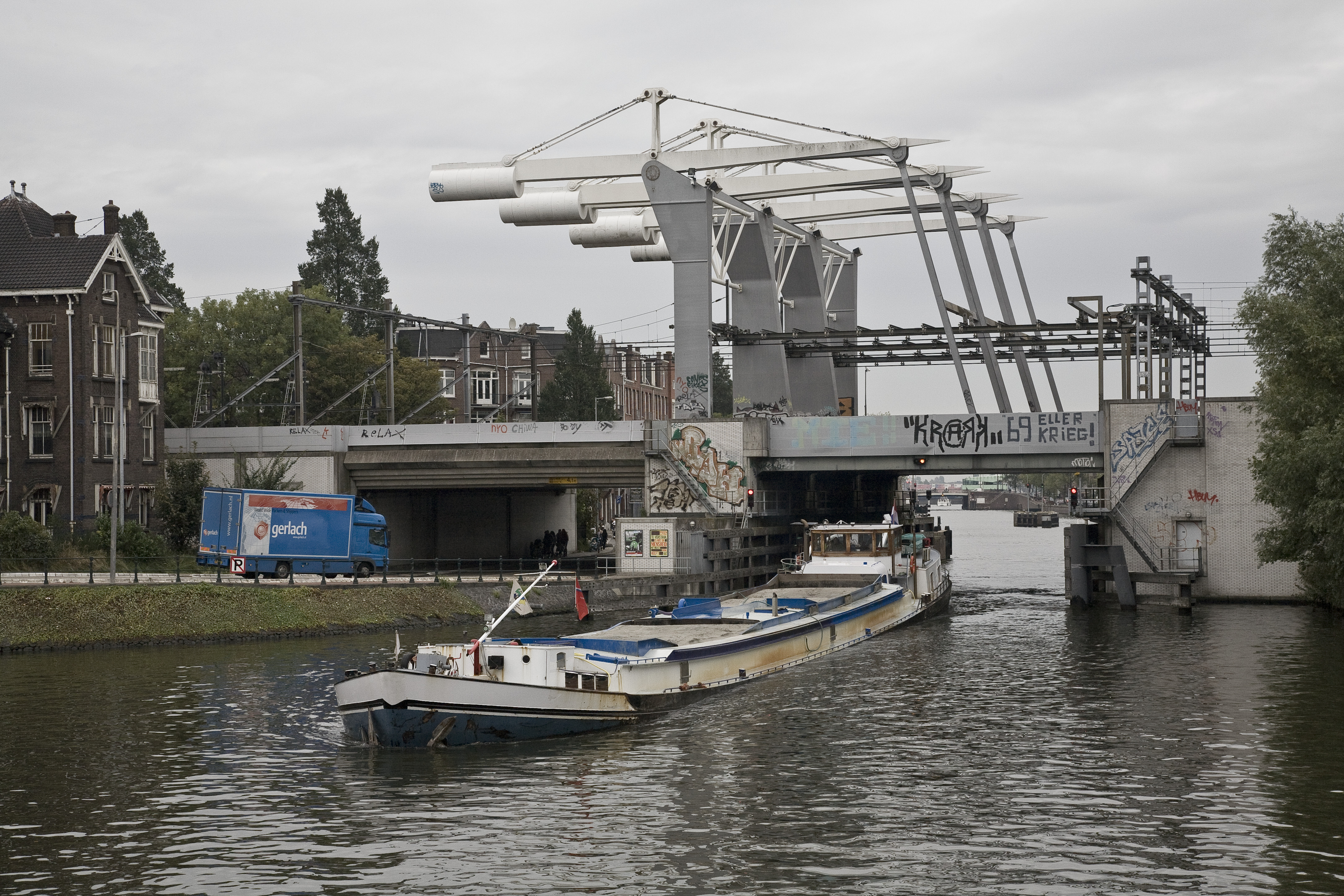 Spoorbrug: Overzicht spoorbrug over de Houtmankade (opmerking: Gefotografeerd t.b.v. publicatie "Tussen Haarlemmerpoort en Halfweg" (auteurs: Jaap Evert Abrahamse - Menne Kosias en Erik Schmitz))